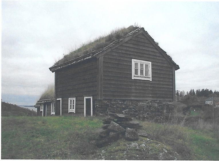 Eldhus på Bogatunet. Foto: Rolf Lønningen, fra Riksantikvarens Kulturminnesøk.